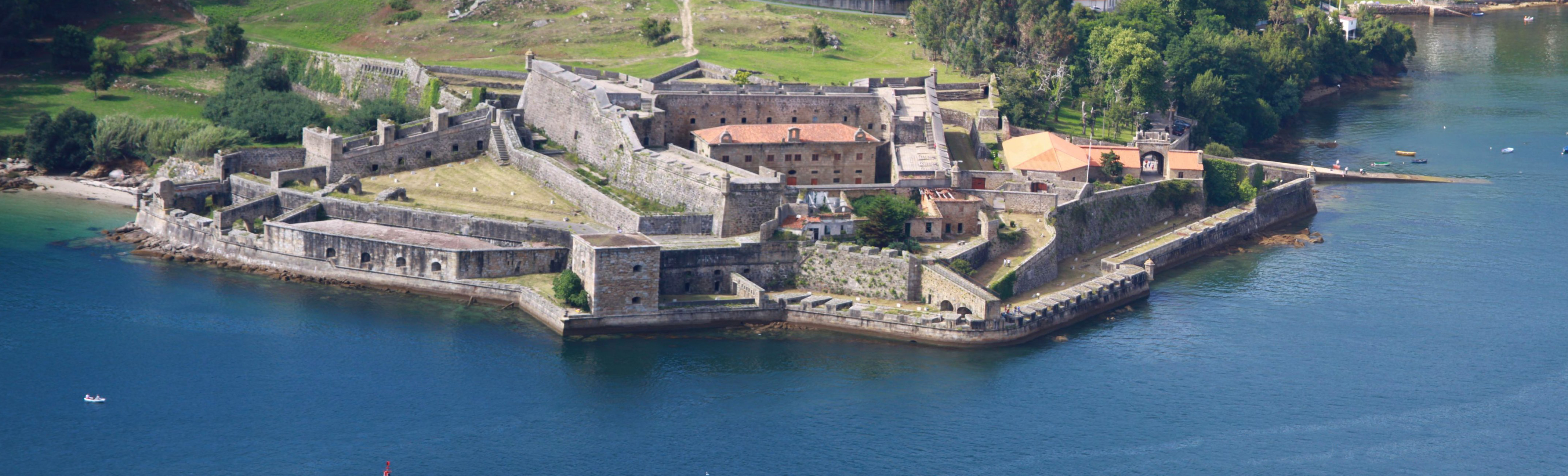 Castelo de San Filipe, Brión, Ferrol, Galiza